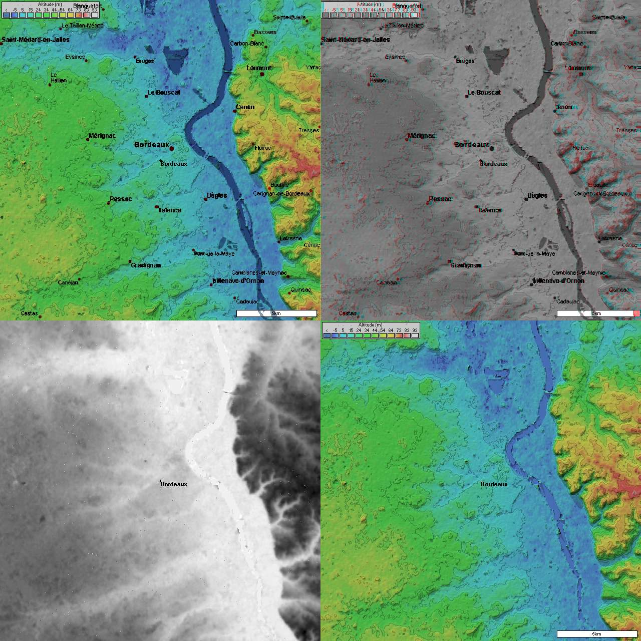 4 images topographique (20 km de coté) de Bordeaux prisent par la mission SRTM. map dans les logiciel 3D) Image topographique sans les villes Générée par le logiciel Radiomobile à partir des données domaine public de la mission SRTM de la NASA.